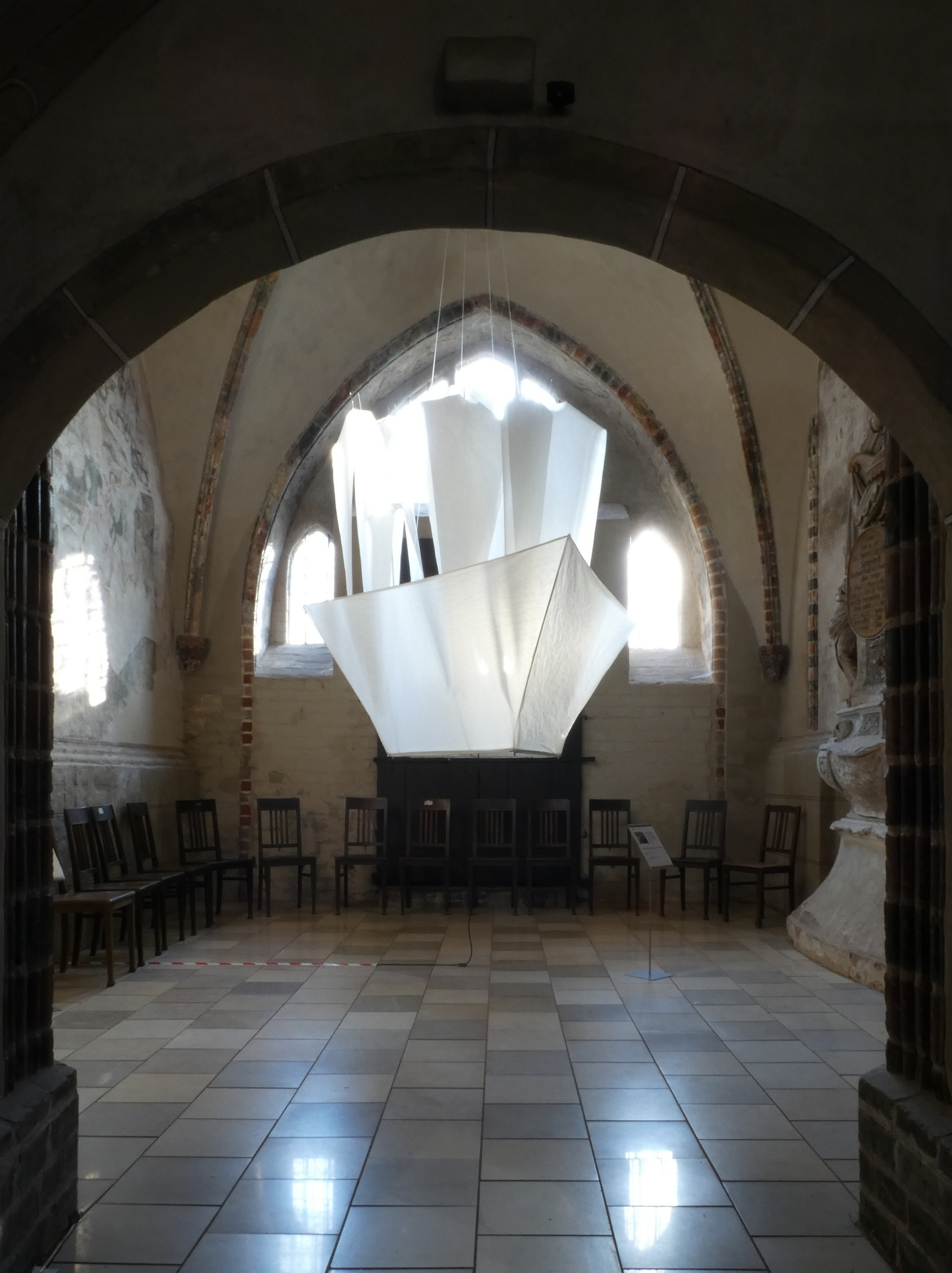 Installation Jene, die aus dem Süden kamen von Thomas Bartel, St. Katharinen